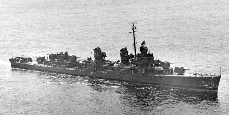 The U.S. Navy destroyer USS Walker (DD-517) underway in 1943.